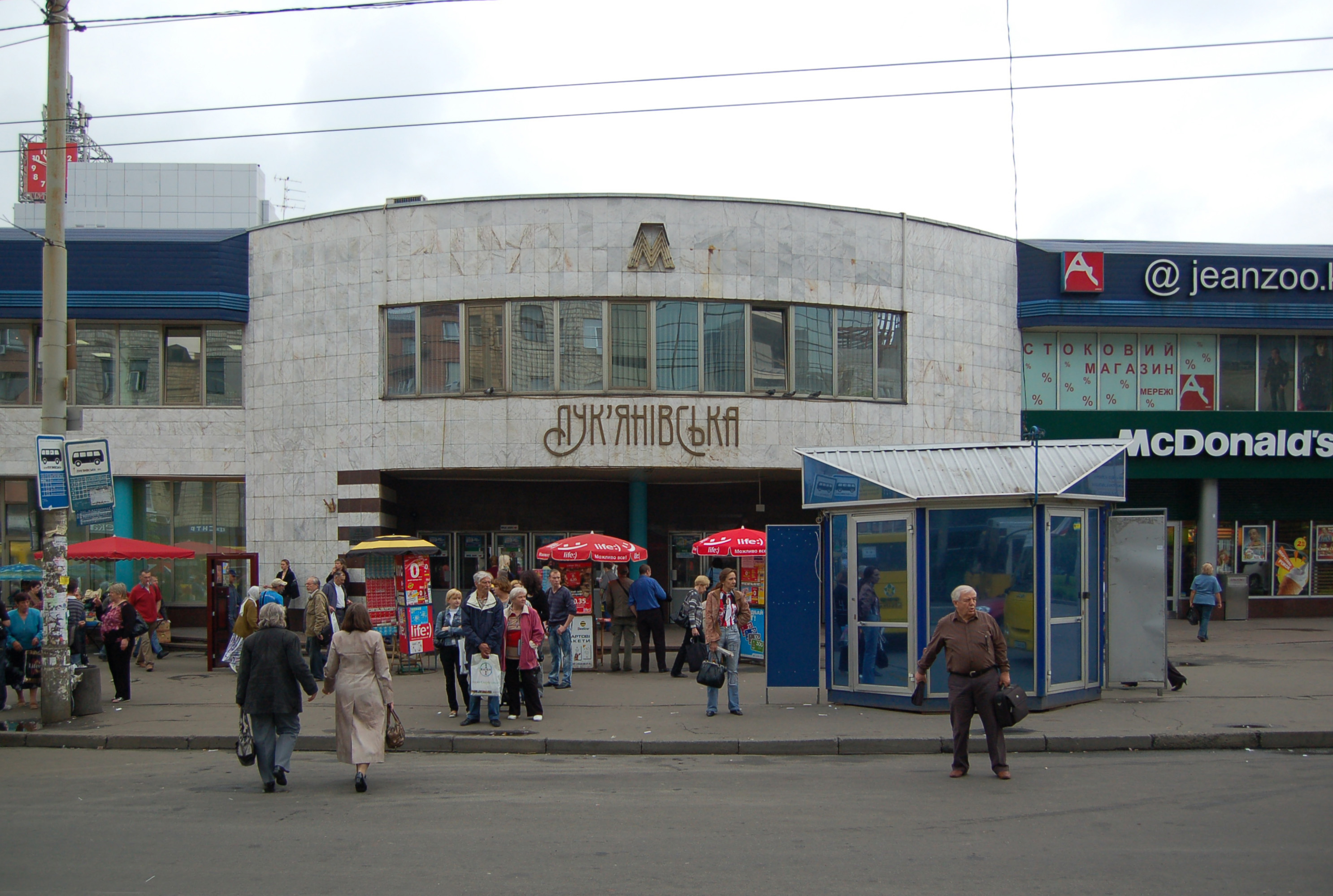 Cтанция метро «Лукьяновская», наземный вестибюль